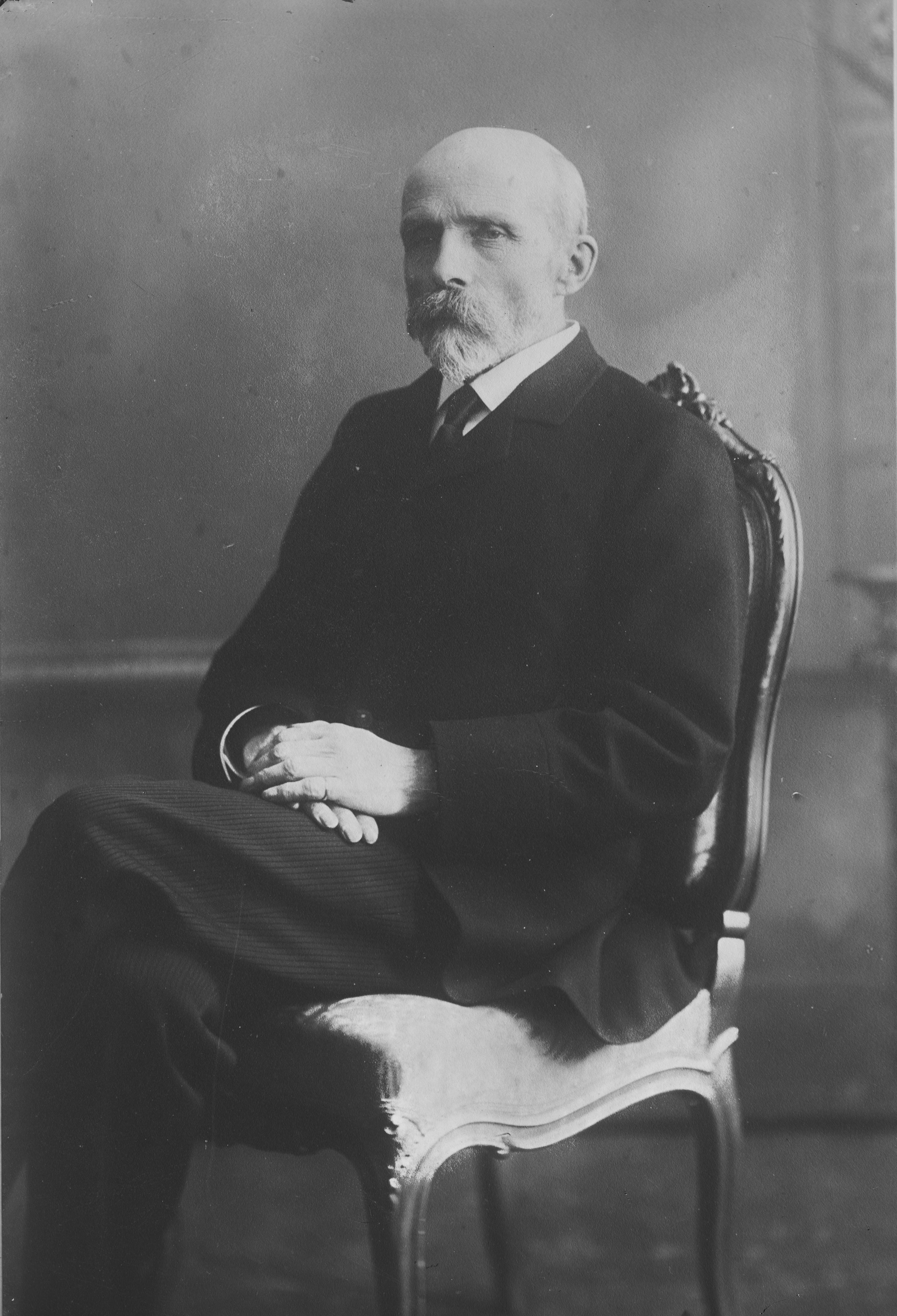 Bildet er hentet fra Nasjonalbibliotekets bildesamling. Anmerkninger til bildet var: Påskrift arkivark: Statsminister Løvenskjold Arkivnummer: 209 Depicted person: Løvenskiold, Carl Otto